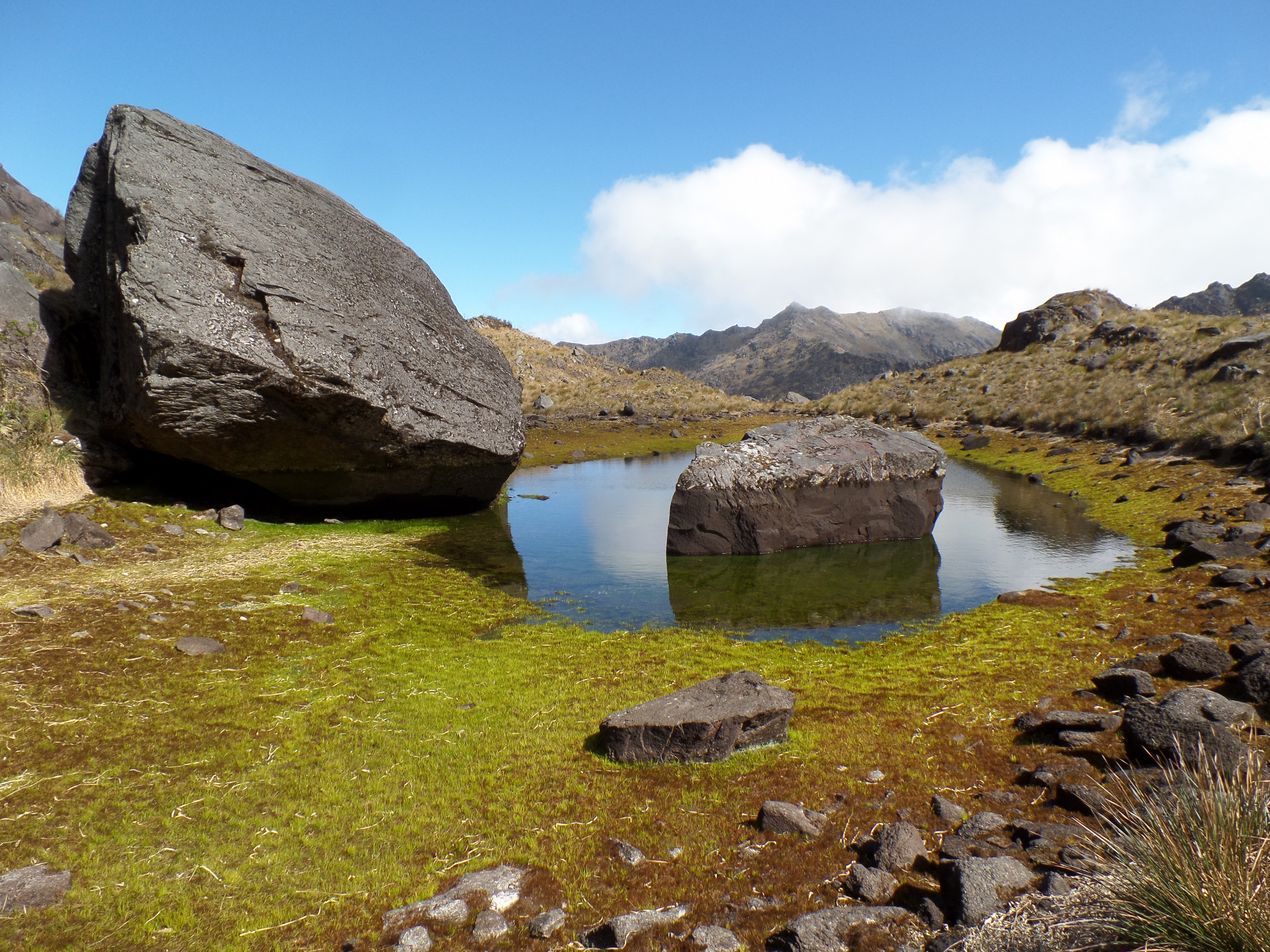 Parque nacional General Juan Pablo Peñaloza